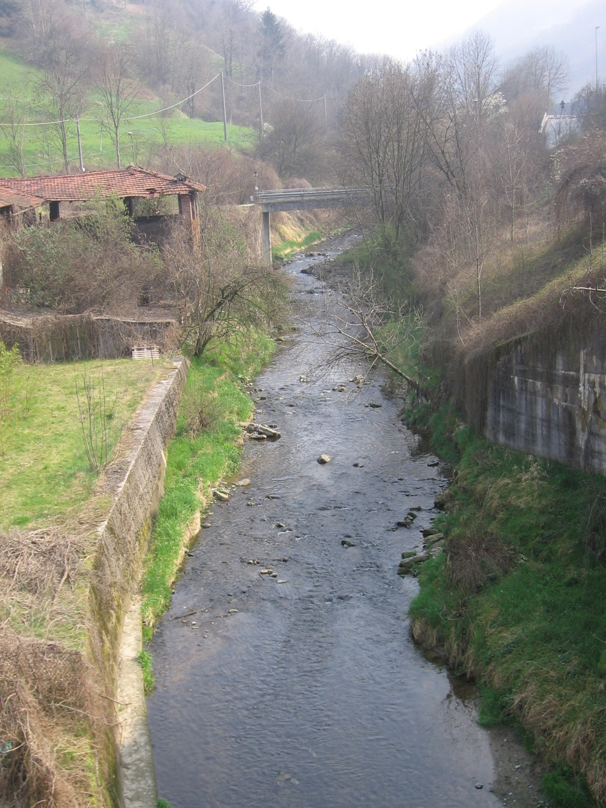 fiume Romna nei pressi dello sbocco nel Serio, Casnigo (BG), Italia